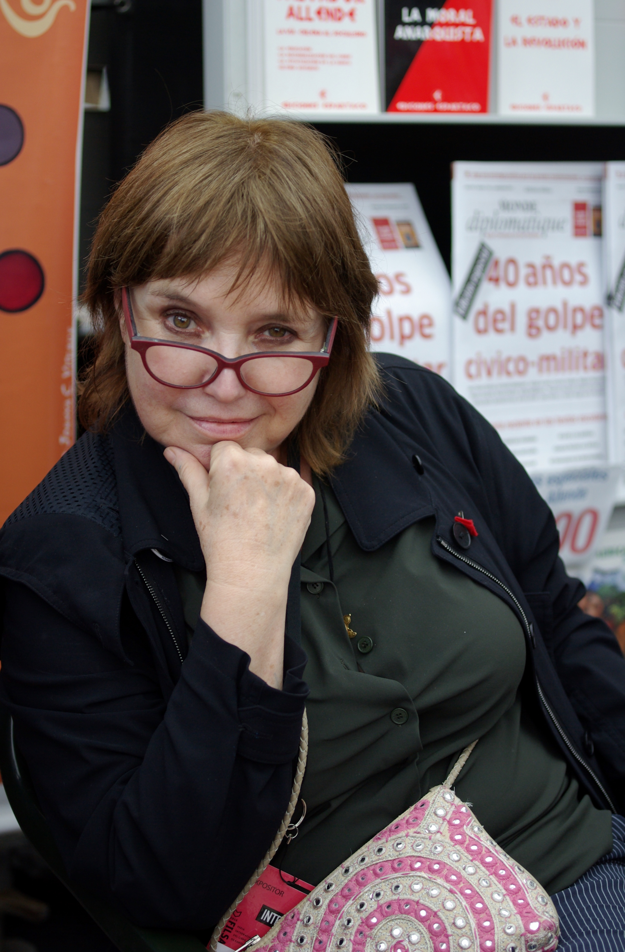 La pintora francesa Federica Matta en la Feria Internacional del Libro de Santiago 2016